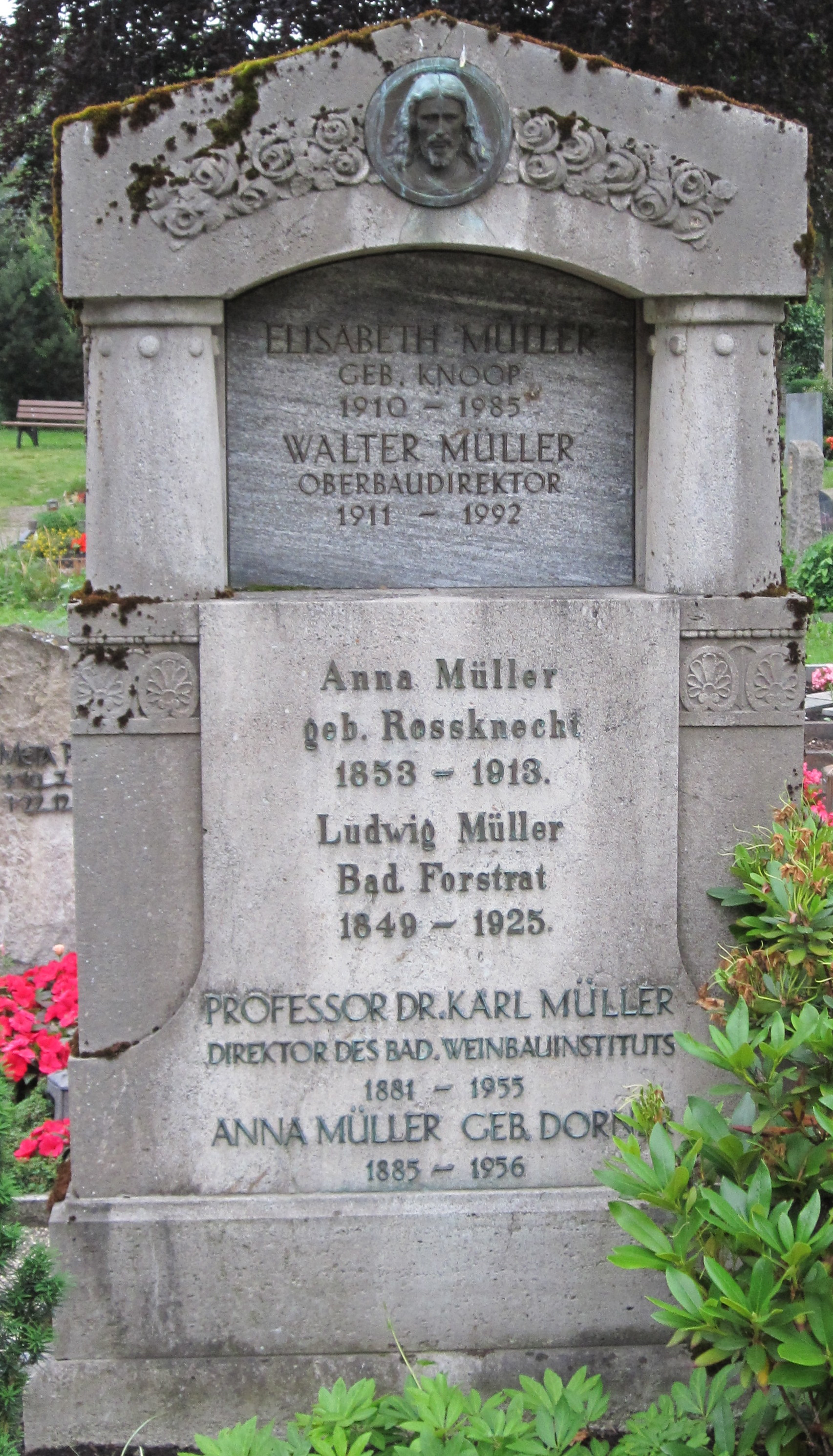 Walter Müller, Oberbaudirektor 1911-1992 Prof. Dr. Karl Müller, Direktor des Weinbauinstitus, 181-1951